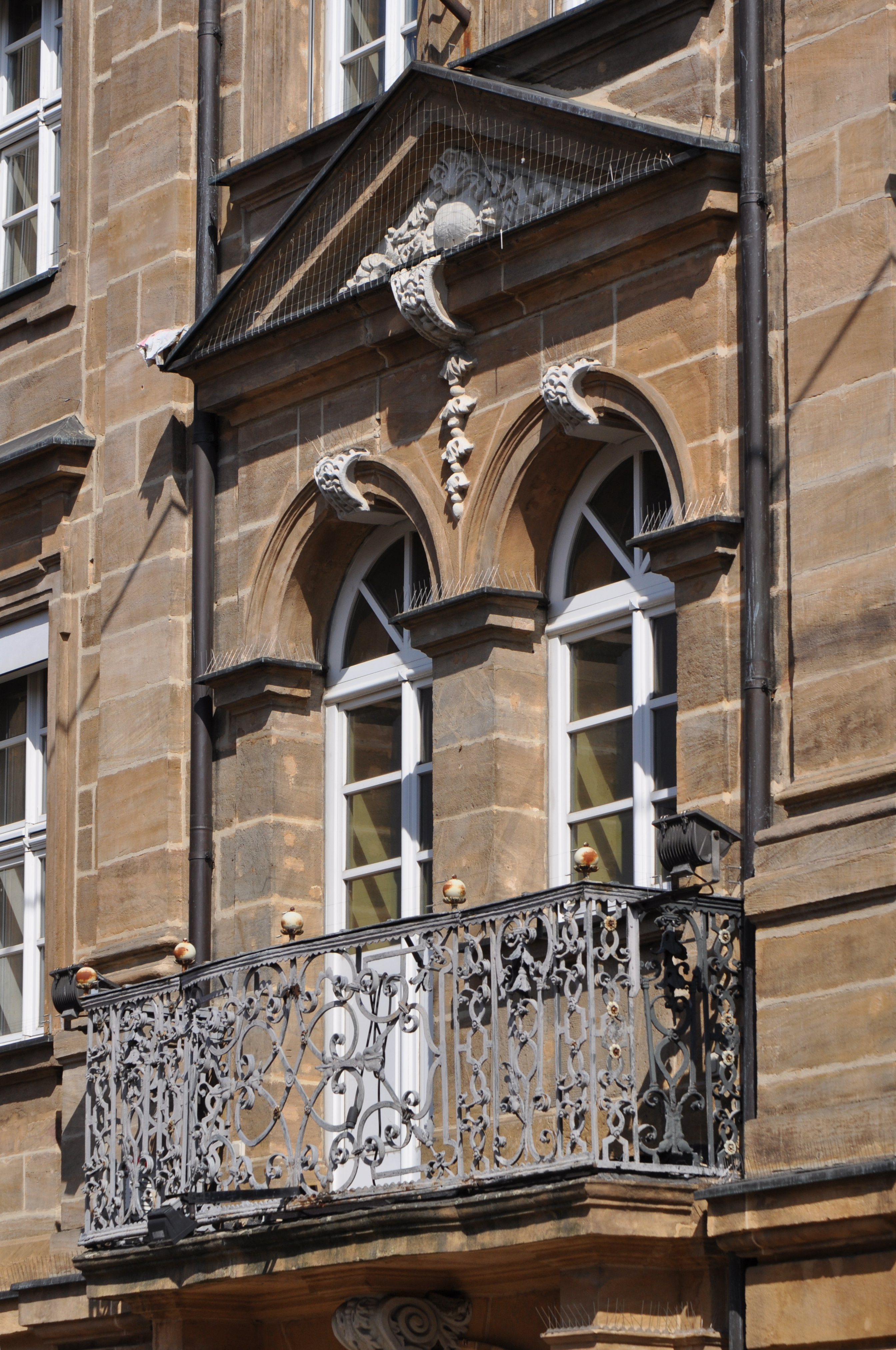 Besoldsches Haus, Hauptstraße 26 in Erlangen.